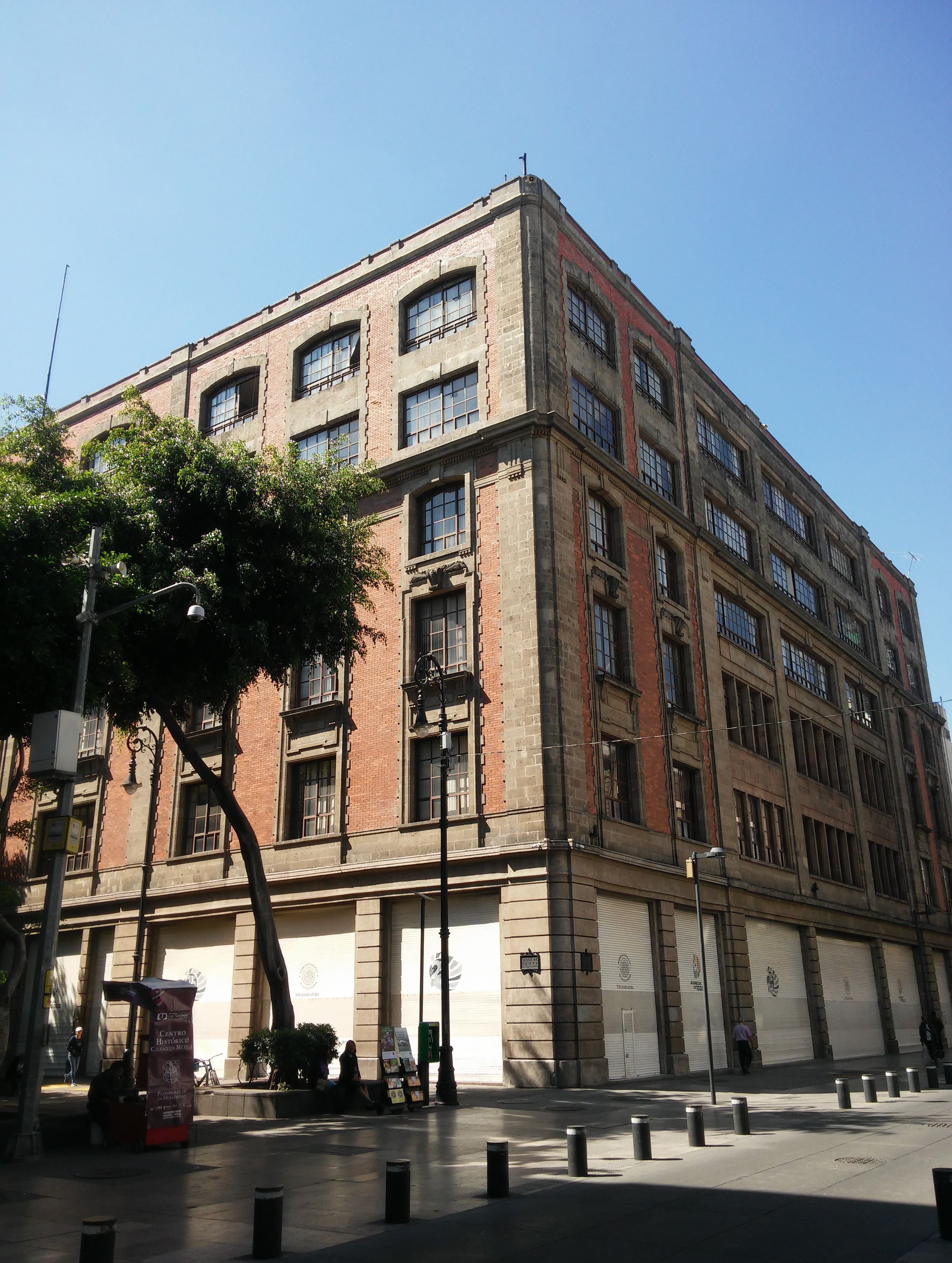 Edificio Edison en el centro histórico de la ciudad de mexico